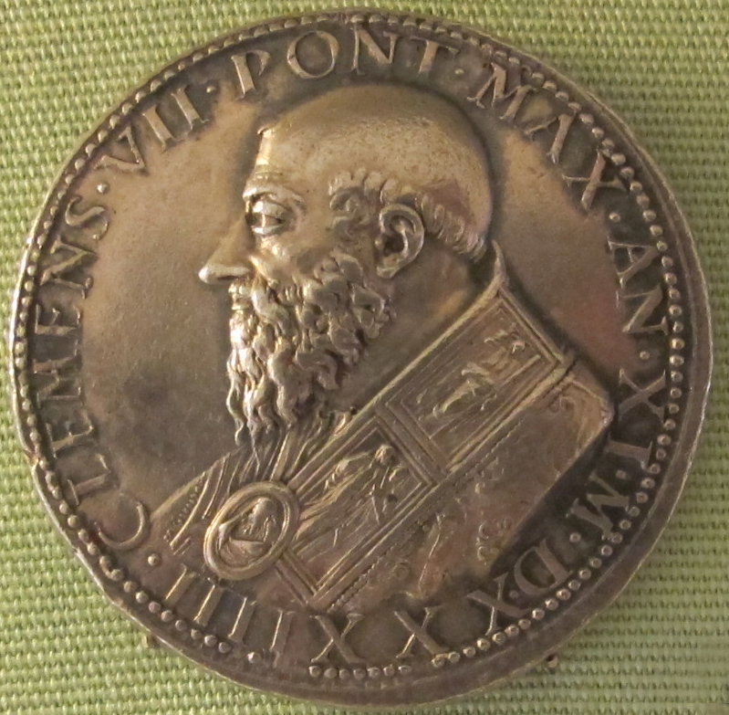 Papa Clemente VII, 1534